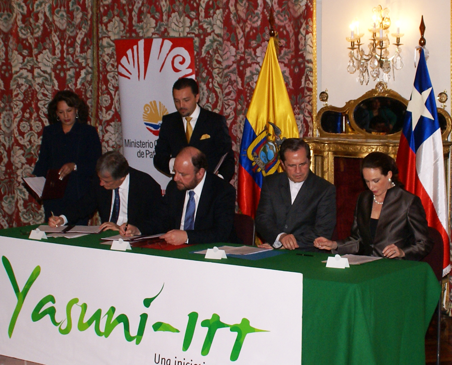 Cancillería 15 de septiembre de 2010